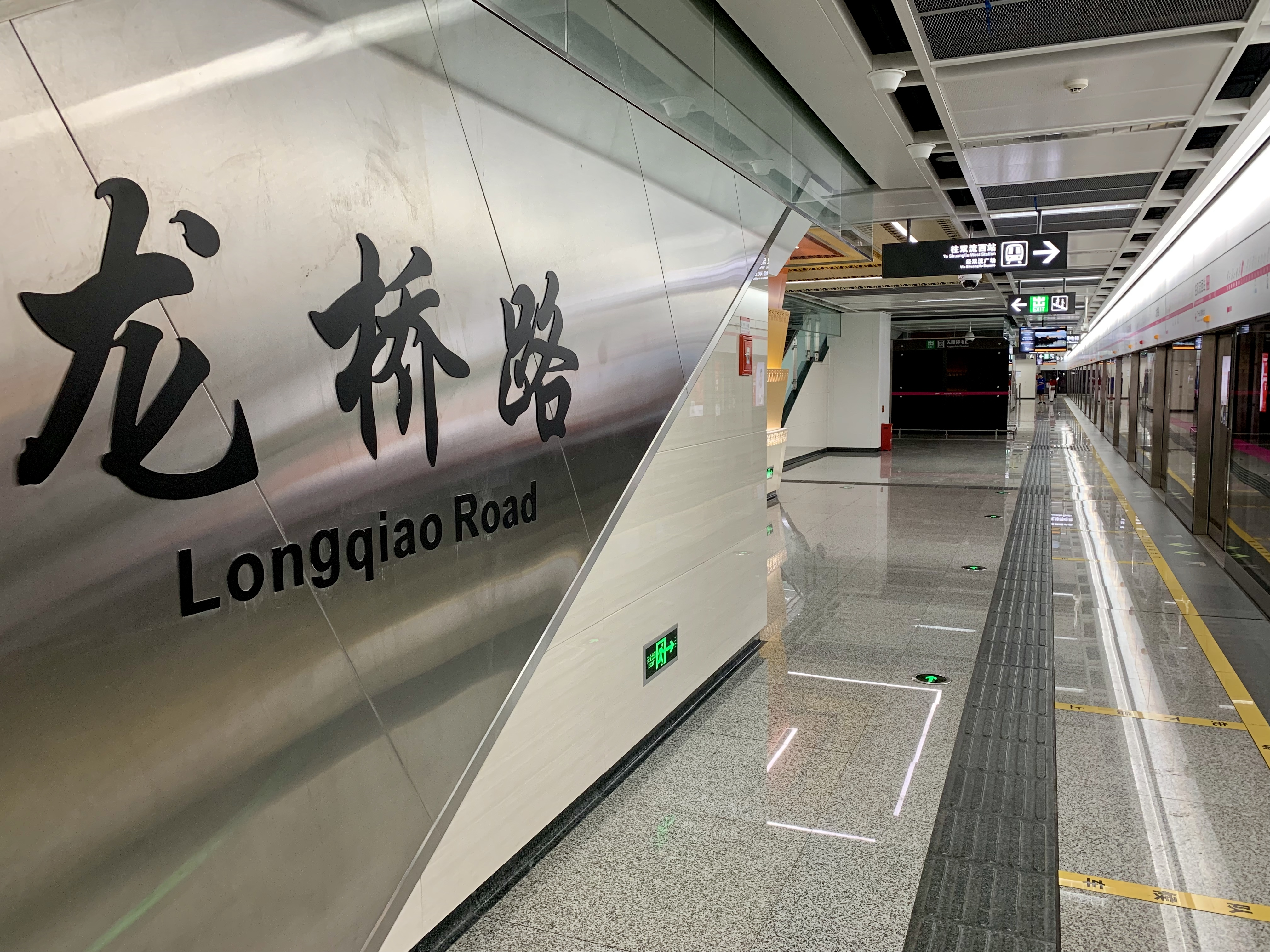 成都地铁龙桥路站